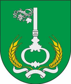 Герб села Василівка (Болградський район)